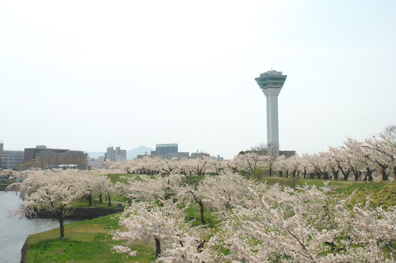 五稜郭の桜を散策しながら撮ってきました。五稜郭タワーと桜。